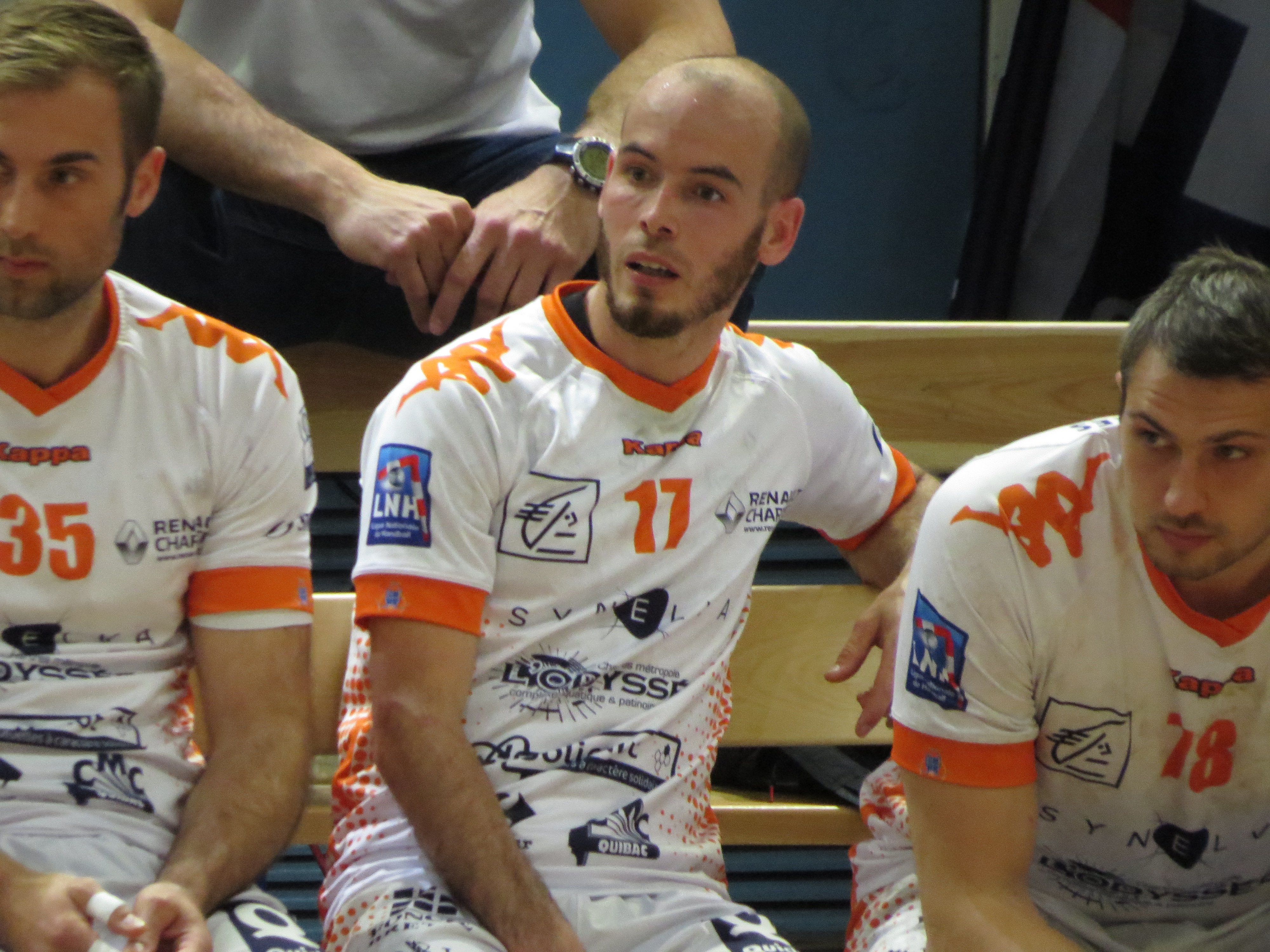 Match du championnat de France de Hand entre Créteil et Chartres Victoire de Créteil 39 - 35 35 : Davor Cutura 17 : Sylvain Kieffer 78 : Alexander Pyshkin